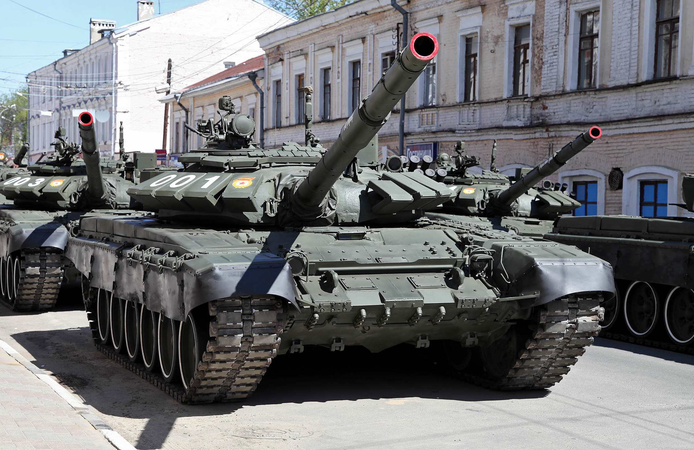 Т-72Б3 на параде Победы в Нижнем Новгороде 9 мая 2014 года.